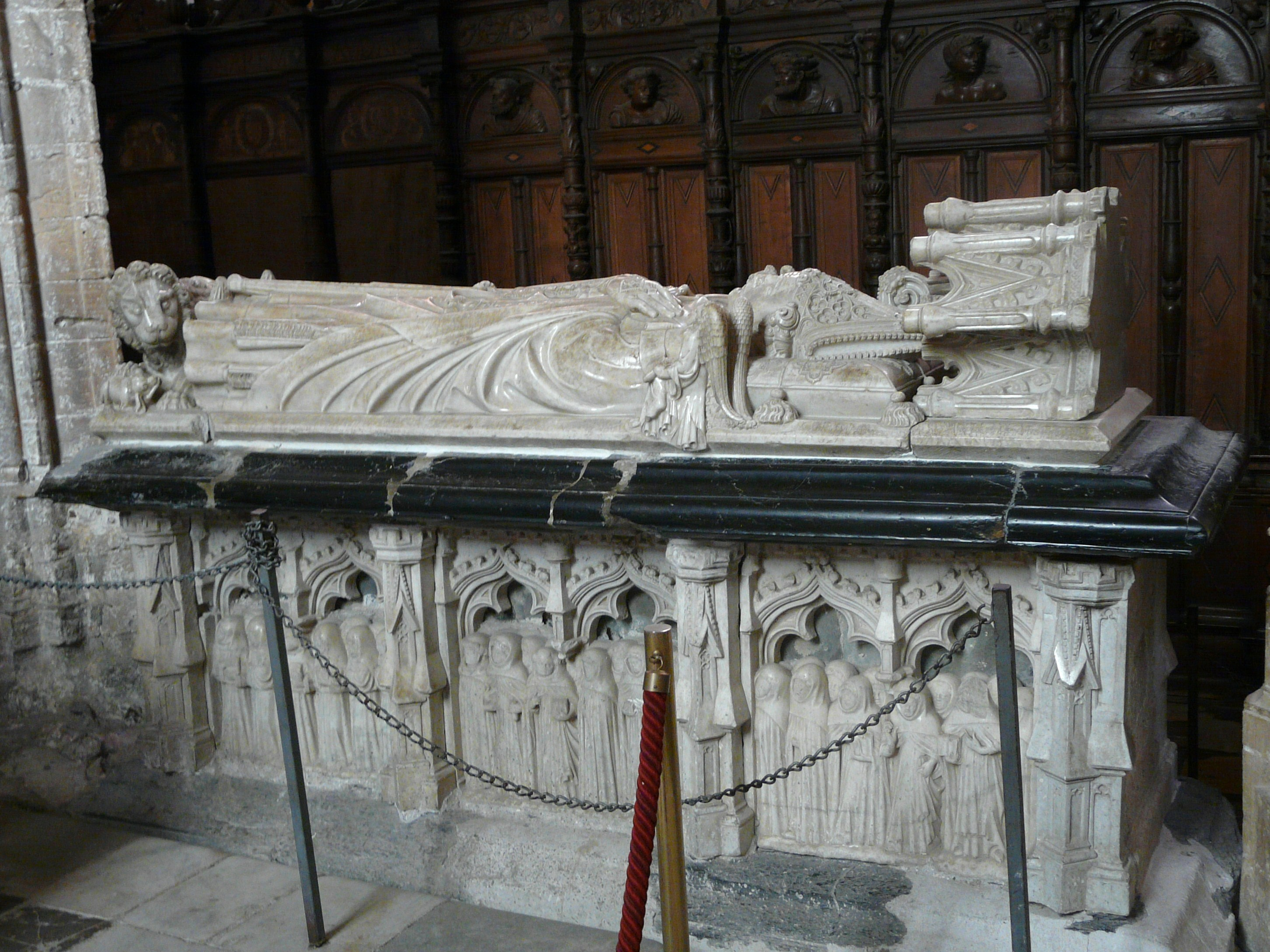 Le gisant d'Hugues de Castillon, Cathédrale de Saint-Bertrand-de-Comminges, Haute-Garonne, France.